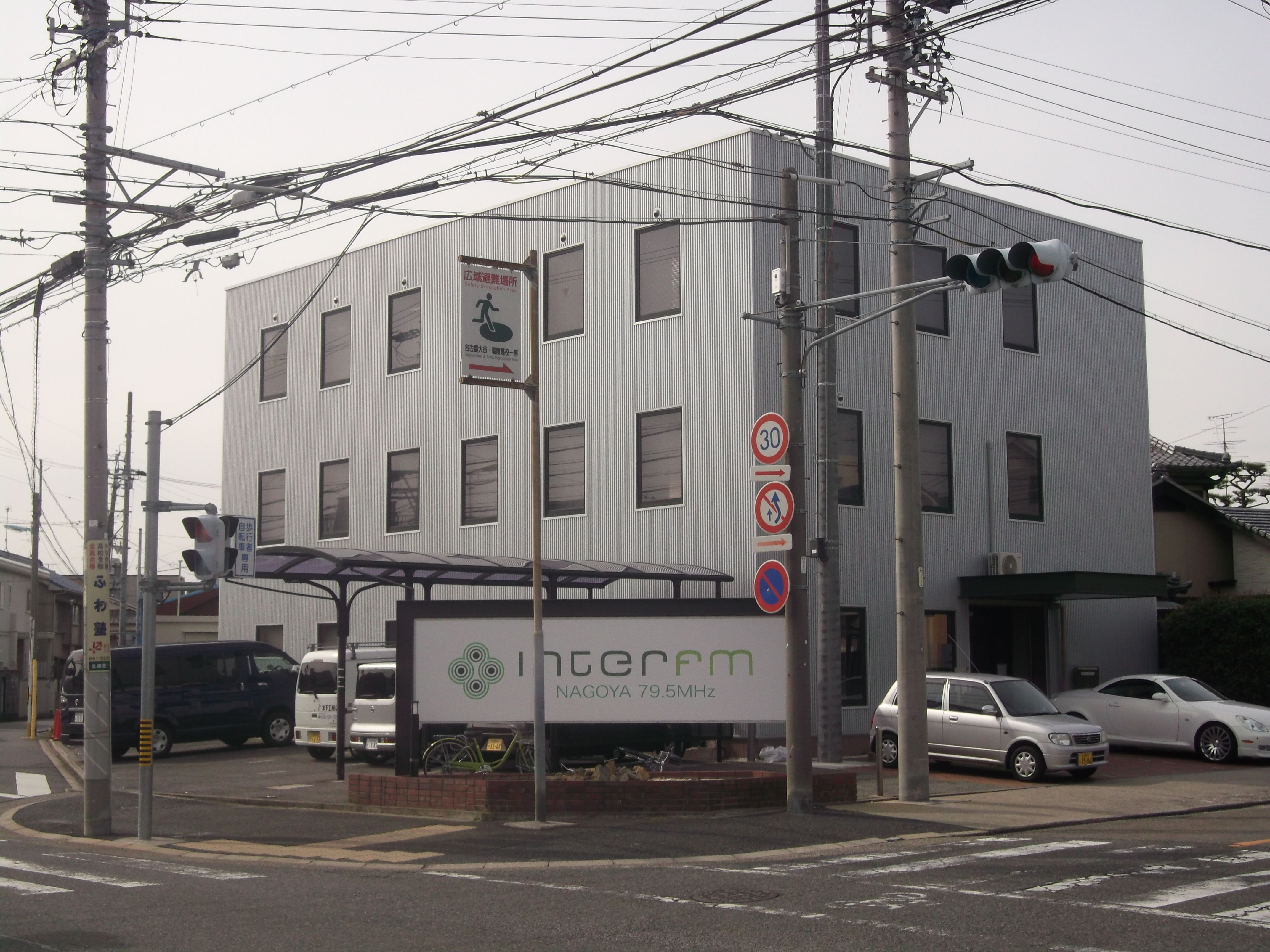 名古屋市瑞穂区北原町に所在するInterFM名古屋支社社屋。